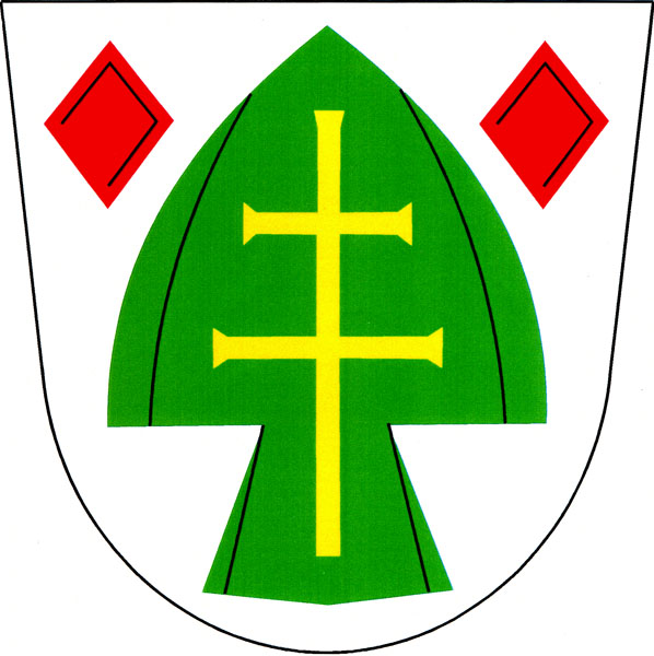 Znak obce Švábov